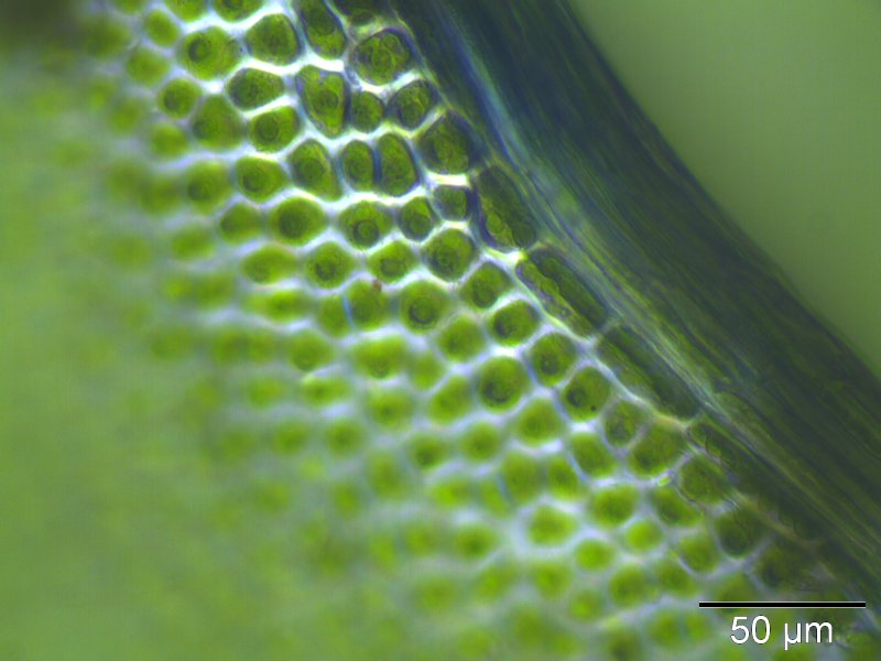 Streifensternmoos Aulacomnium androgynum, Laminazellen mit Mittelrippe, Vergrößerung: 400x, Rostock